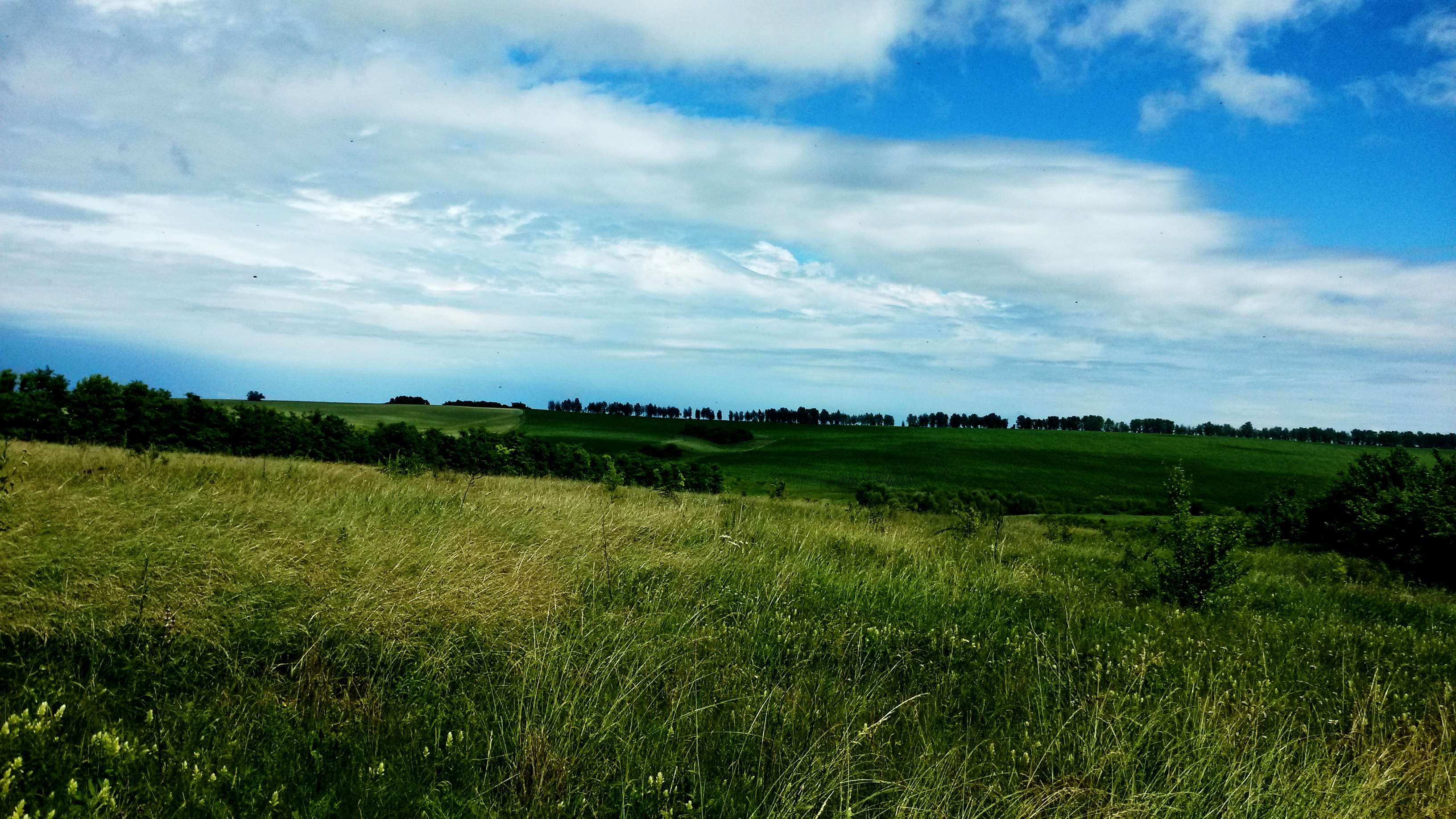 Центрально-Черноземный им.проф.В.В.Алёхина, Горшеченский район This image is related to the protected area of Russia number 4600019